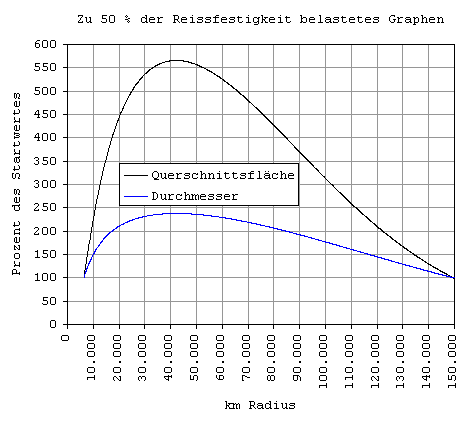 Weltraumlift aus Graphen mit konstanter Belastung